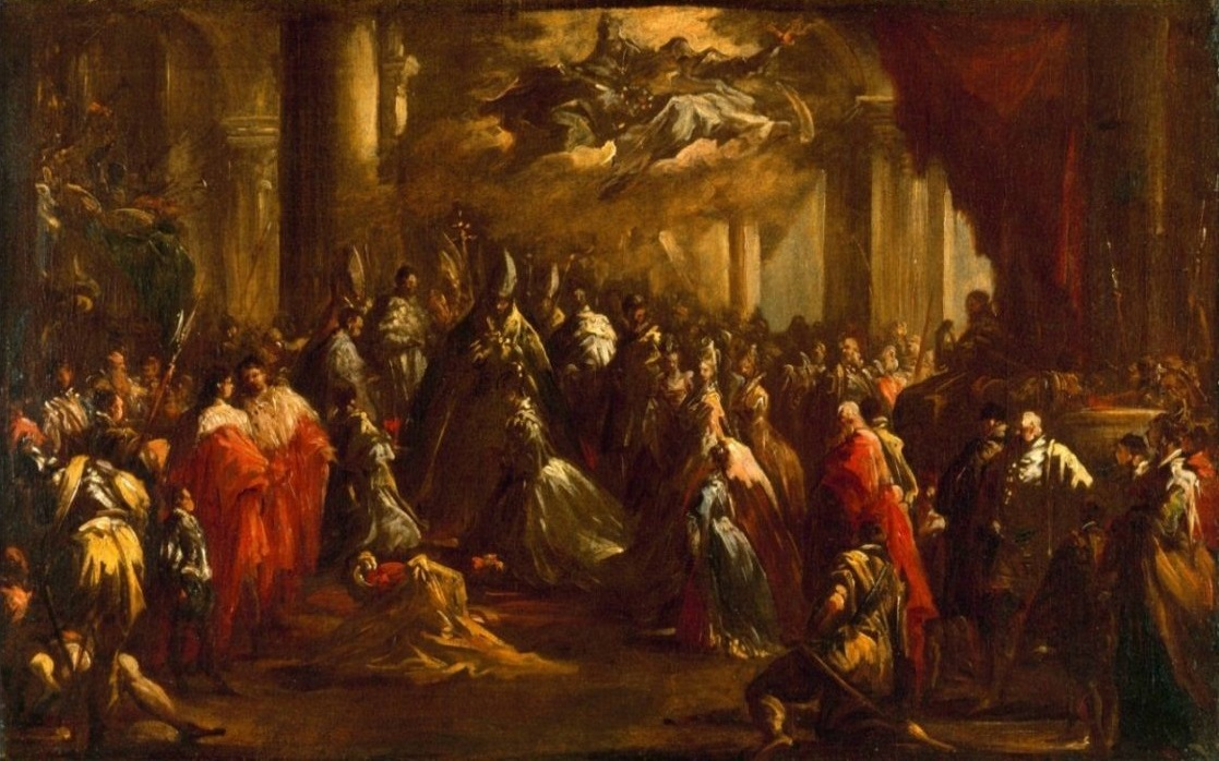 Джованни Антонио Пеллегрини. Коронация Элеоноры Магдалины Терезии Пфальц-Нейбургской в 1690 году. (1713-1715). Замок Бенсберг, Бенсберг.